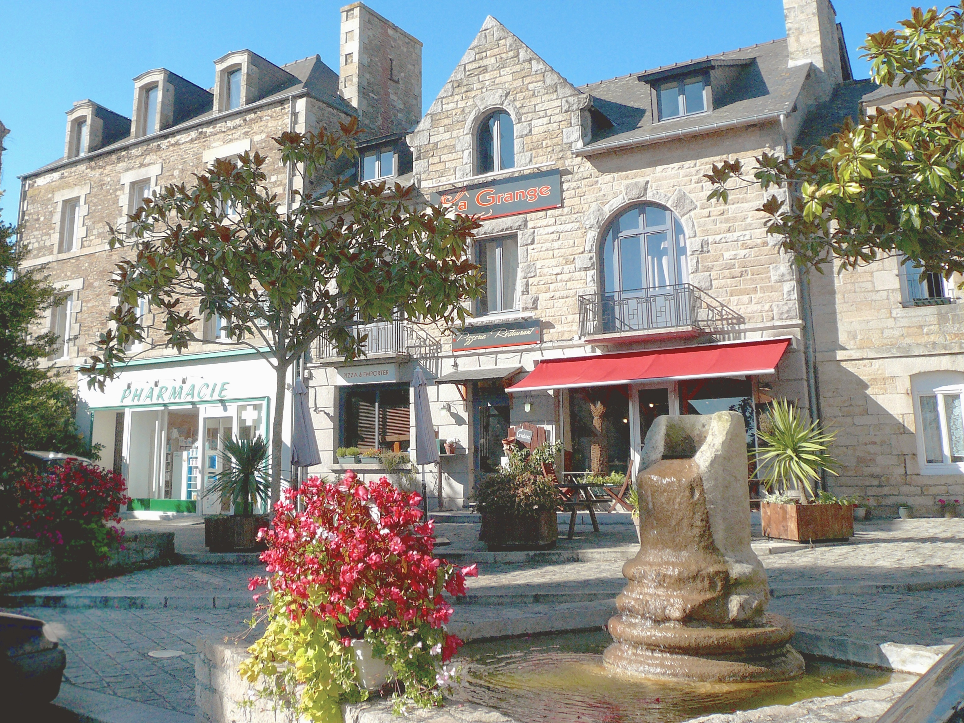 Fontaine, restaurant et pharmacie, place de l'église à Corseul (22).